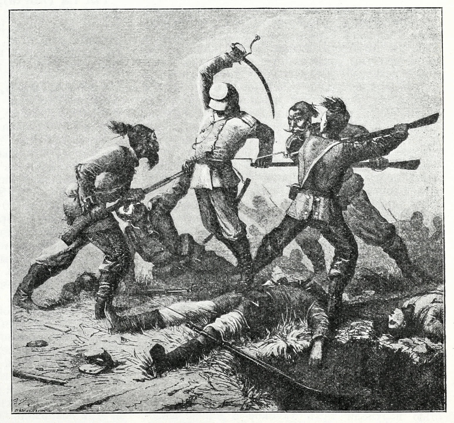 Геройската Смърт на майор Фьодор Матвеевич Горталов